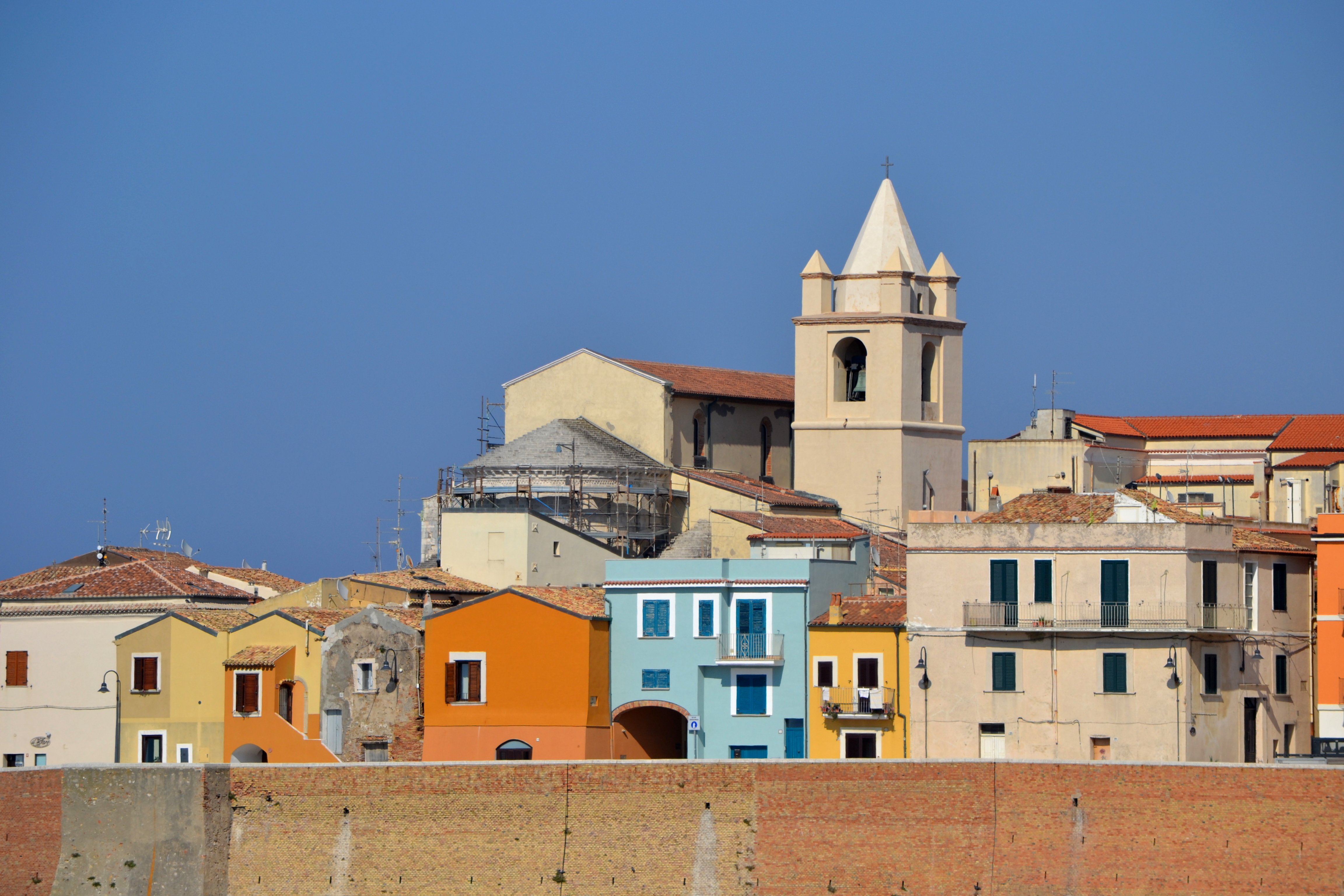 veduta del centro di Termoli